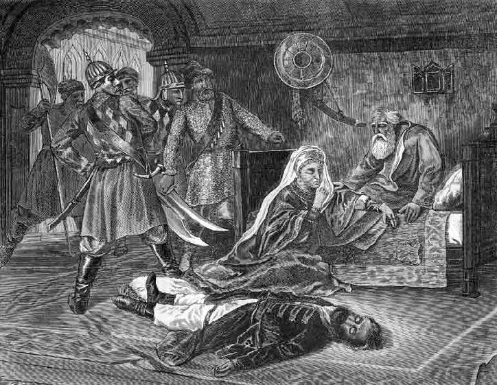 Zabójstwo kniazia Michaiła Dołgorukowa